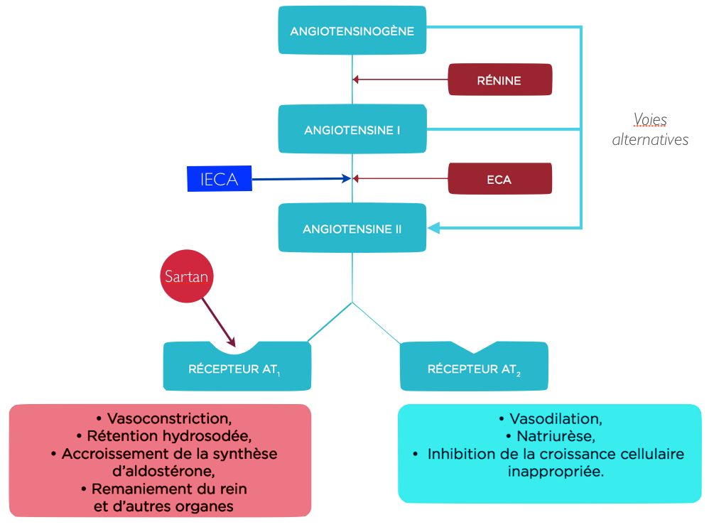 Le Système Rénine Angiotensine Aldostérone et les niveaux d'action de ses principaux modulateurs